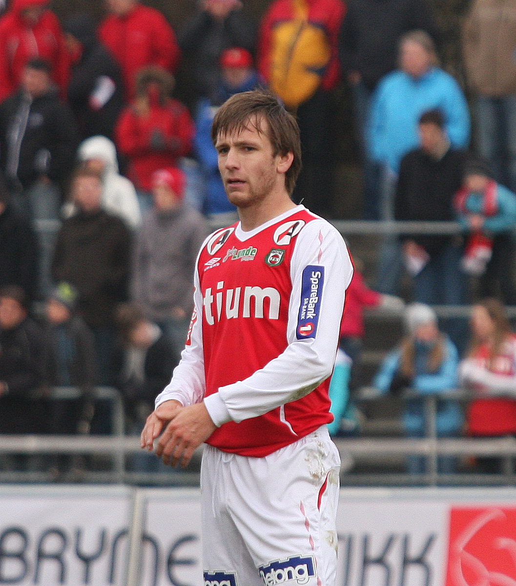 Espen Ertzeid, Bryne FK